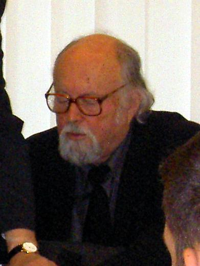 Milan Nakonečný